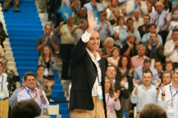 Francisco Camps en el XII Congreso del Partido Popular de la Comunidad Valenciana (octubre de 2008).